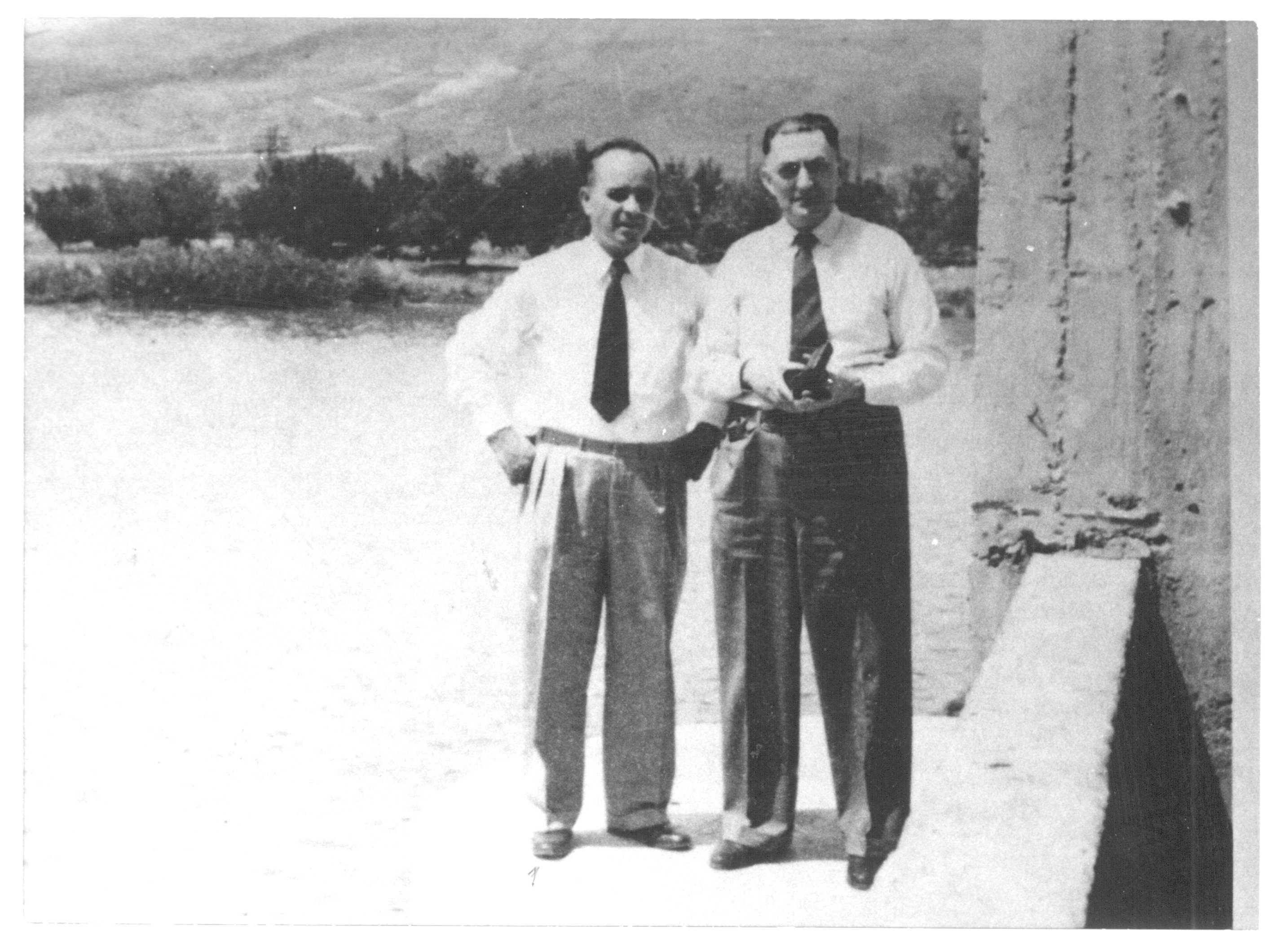 יקותיאל בהרב ואדם נוסף ליד מבנה תחנת הכוח נהריים